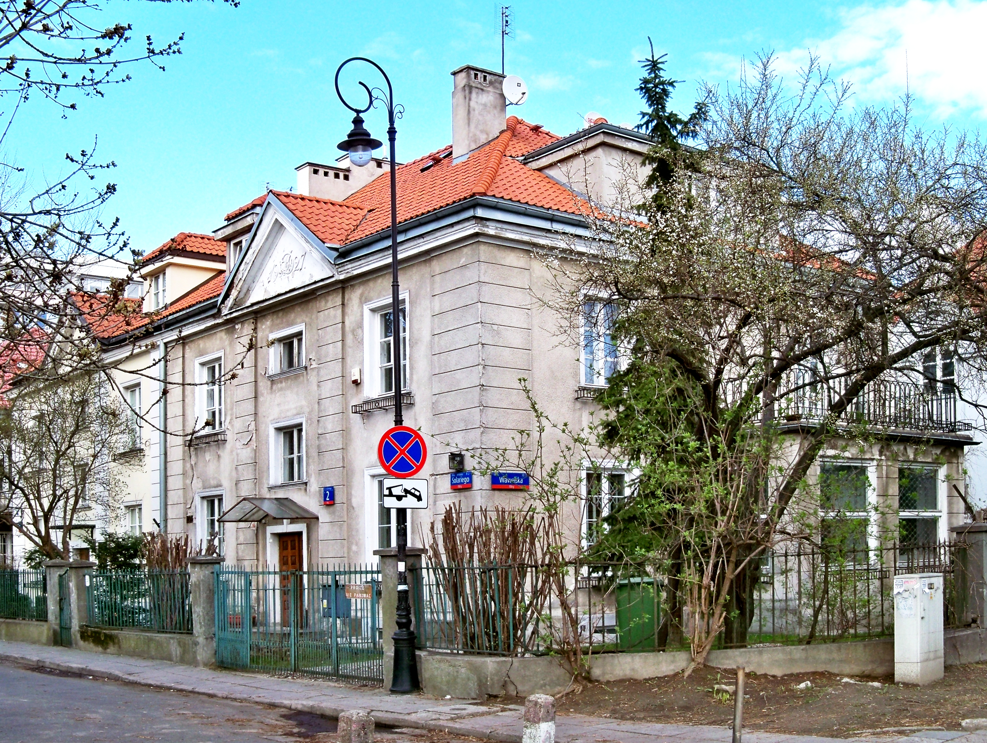 Fragment Kolonii Staszica w Warszawie, dom przy ul. Solariego 2, róg Wawelskiej